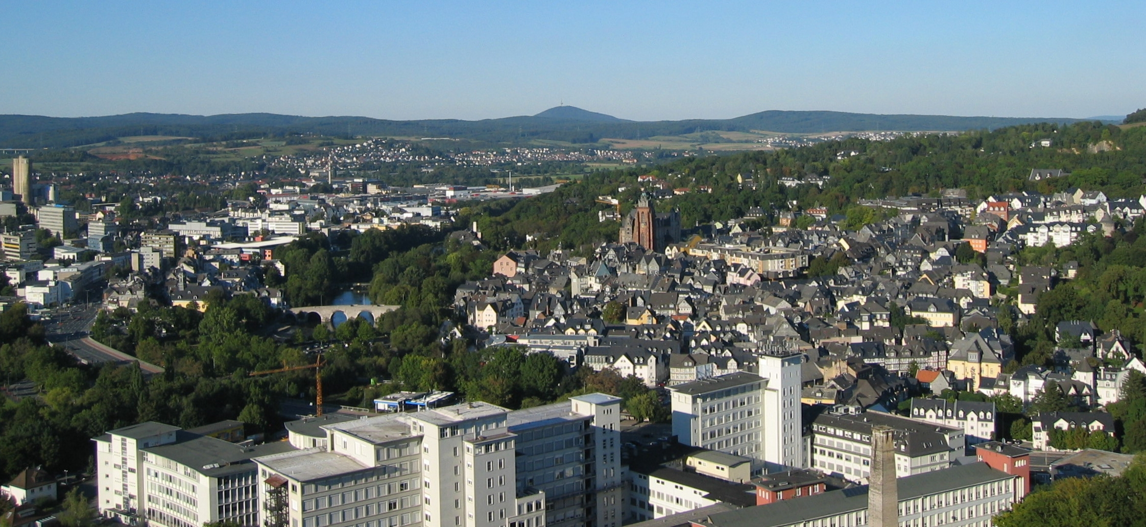 Wetzlar an der Lahn. Blick vom "Kalsmunt" auf Wetzlar. Bildvordergrund: Leica Gebäude und neues Rathaus. Bildmitte Lahnbrücke, Dom und Altstadt. Aufgenommen am 19.09.2005